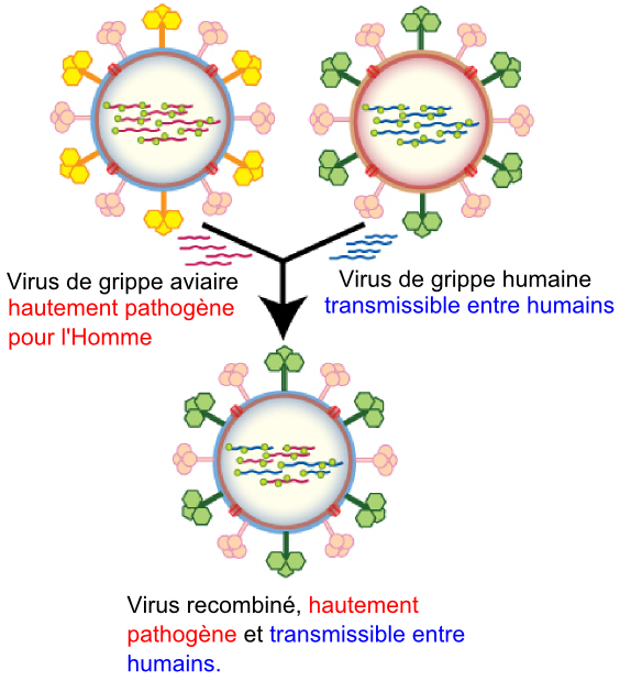 schema de recombinaison des virus de la grippe